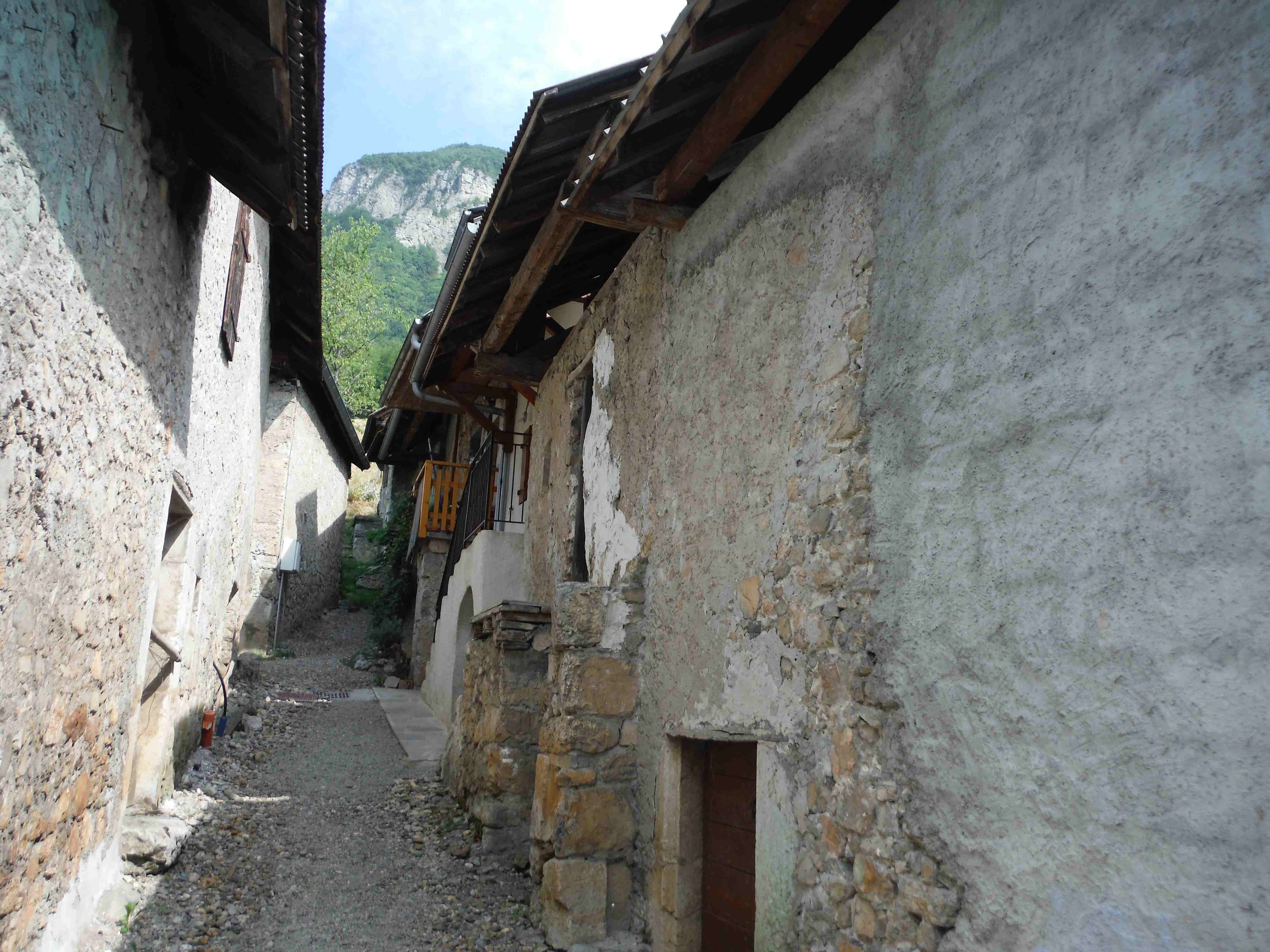 photo sarto